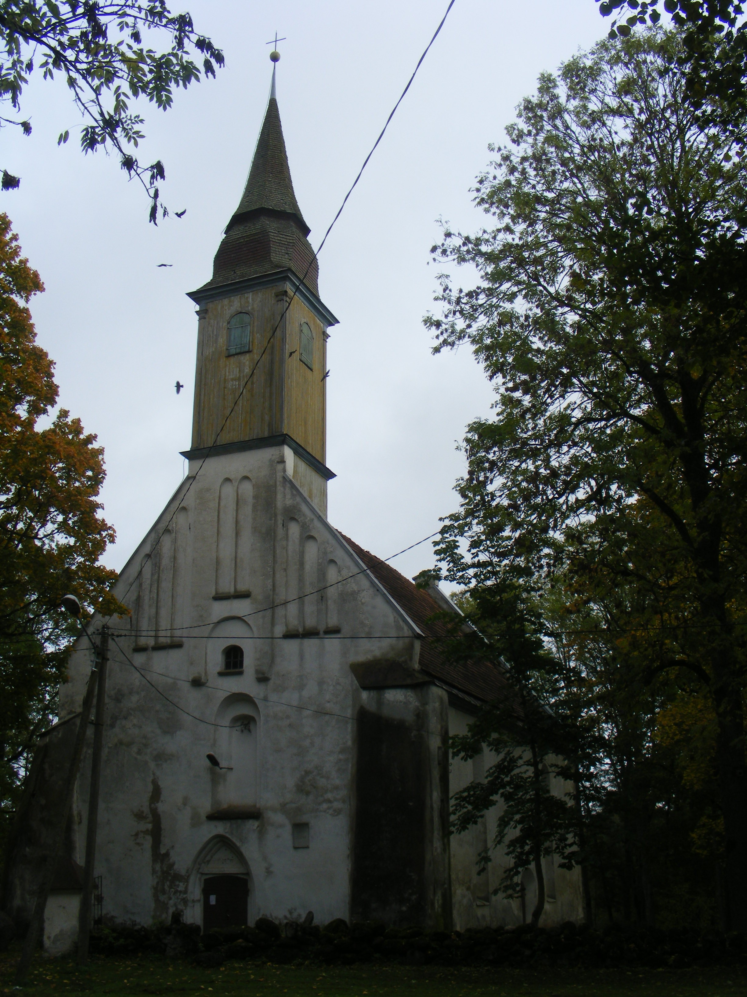 Kiriku läänefassaad.